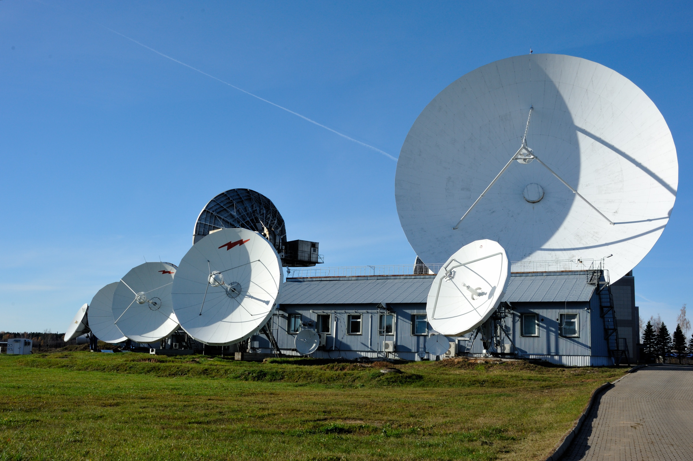 ЦКС Дубна